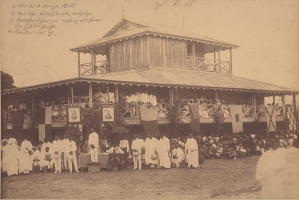 Begräbnis des 1914 durch die deutsche Kolonialverwaltung hingerichteten kamerunischen Königs der Duala Rudolf Manga Bell. (Perspektivische Verzerrung entfernt und Zuschnitt)